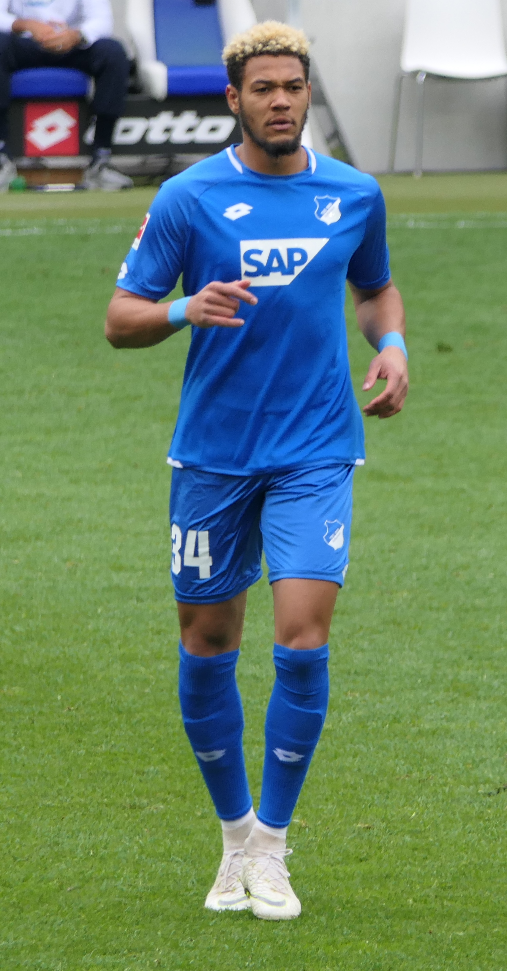 Der Fussballprofi Joelinton im Trikot der TSG 1899 Hoffenheim beim Heimspiel gegen den SV Werder Bremen am 11.05.2019.